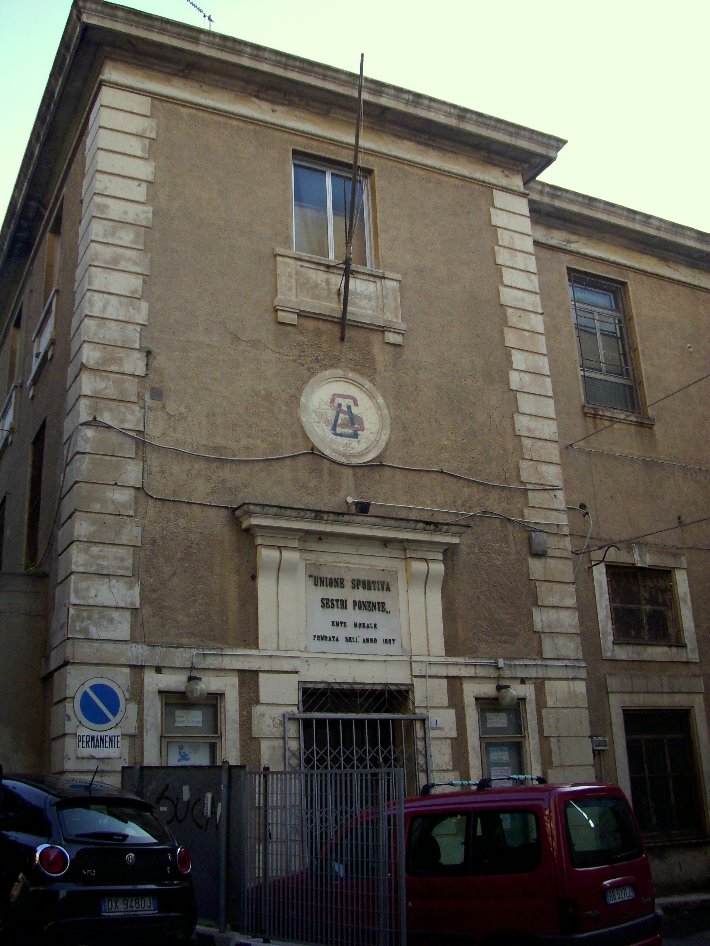 L'edificio dove ha sede l'Unione Sportiva Sestri Ponente